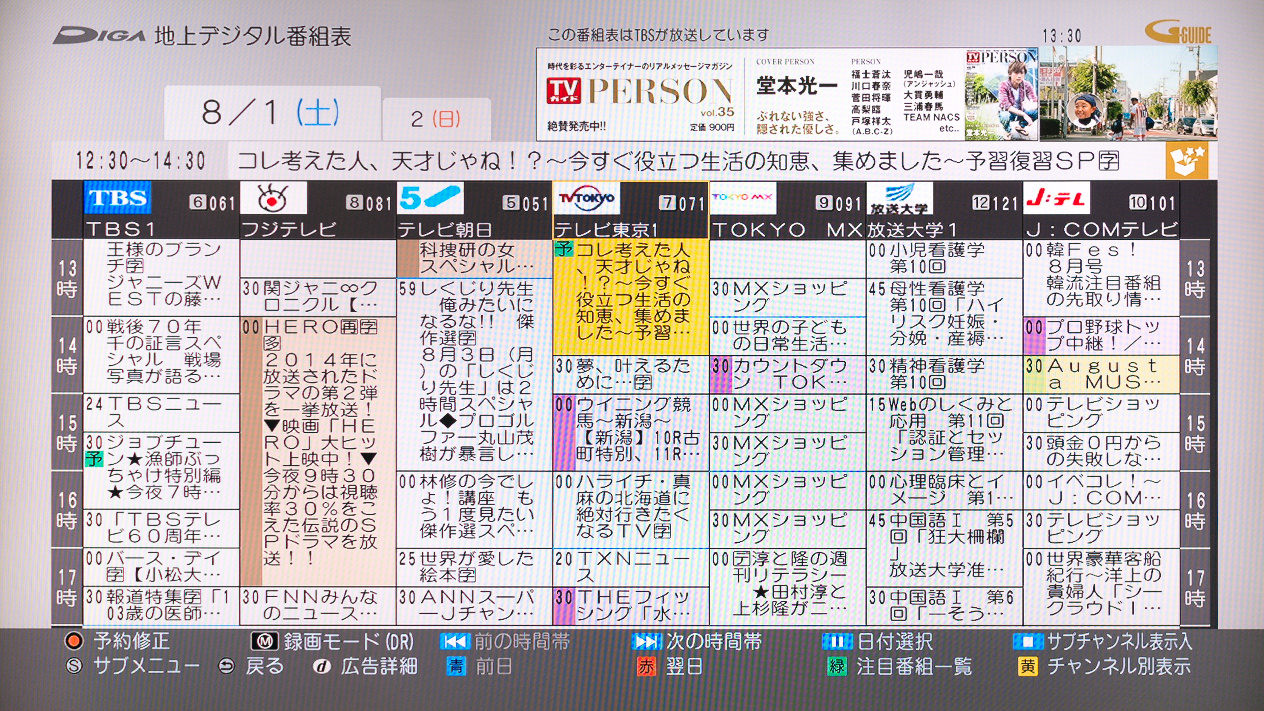 DIGA地上デジタル番組表